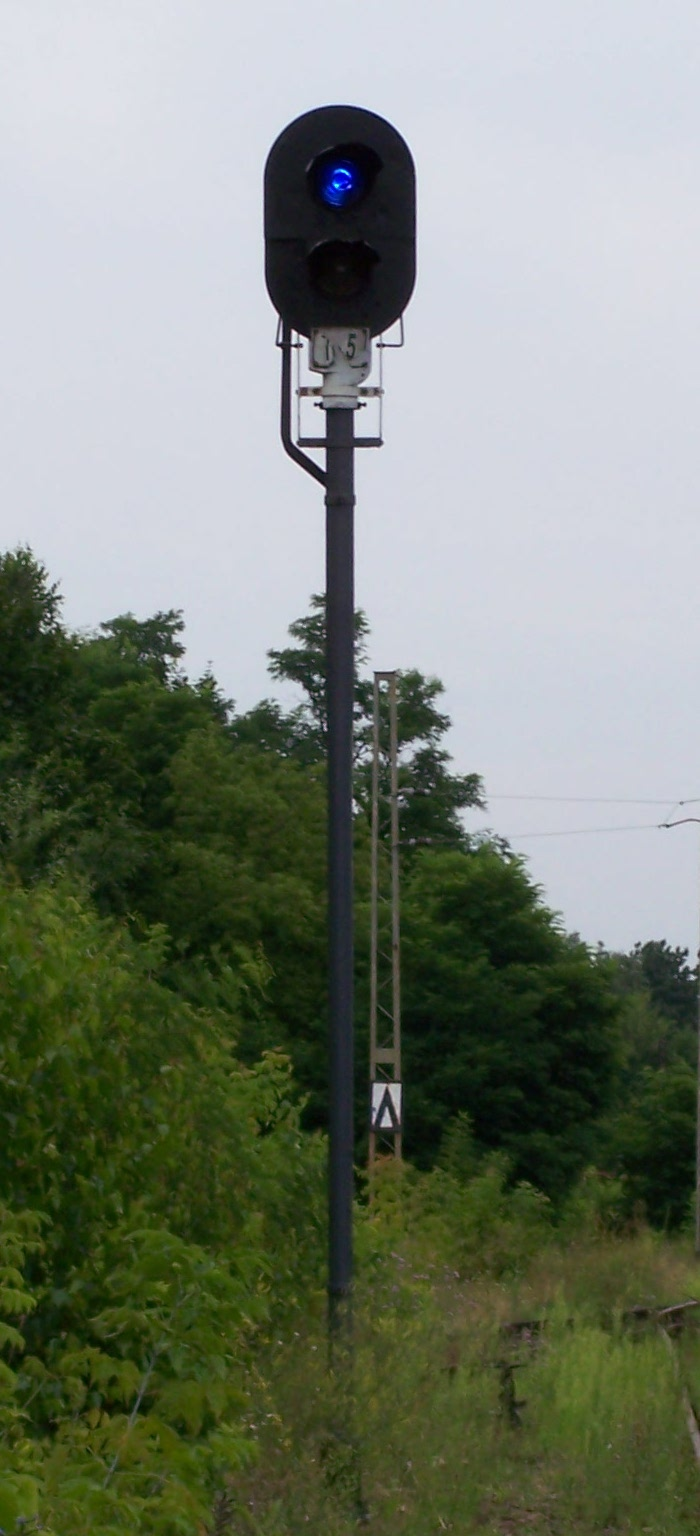 Tarcza manewrowa świetlna na stacji w Otwocku.